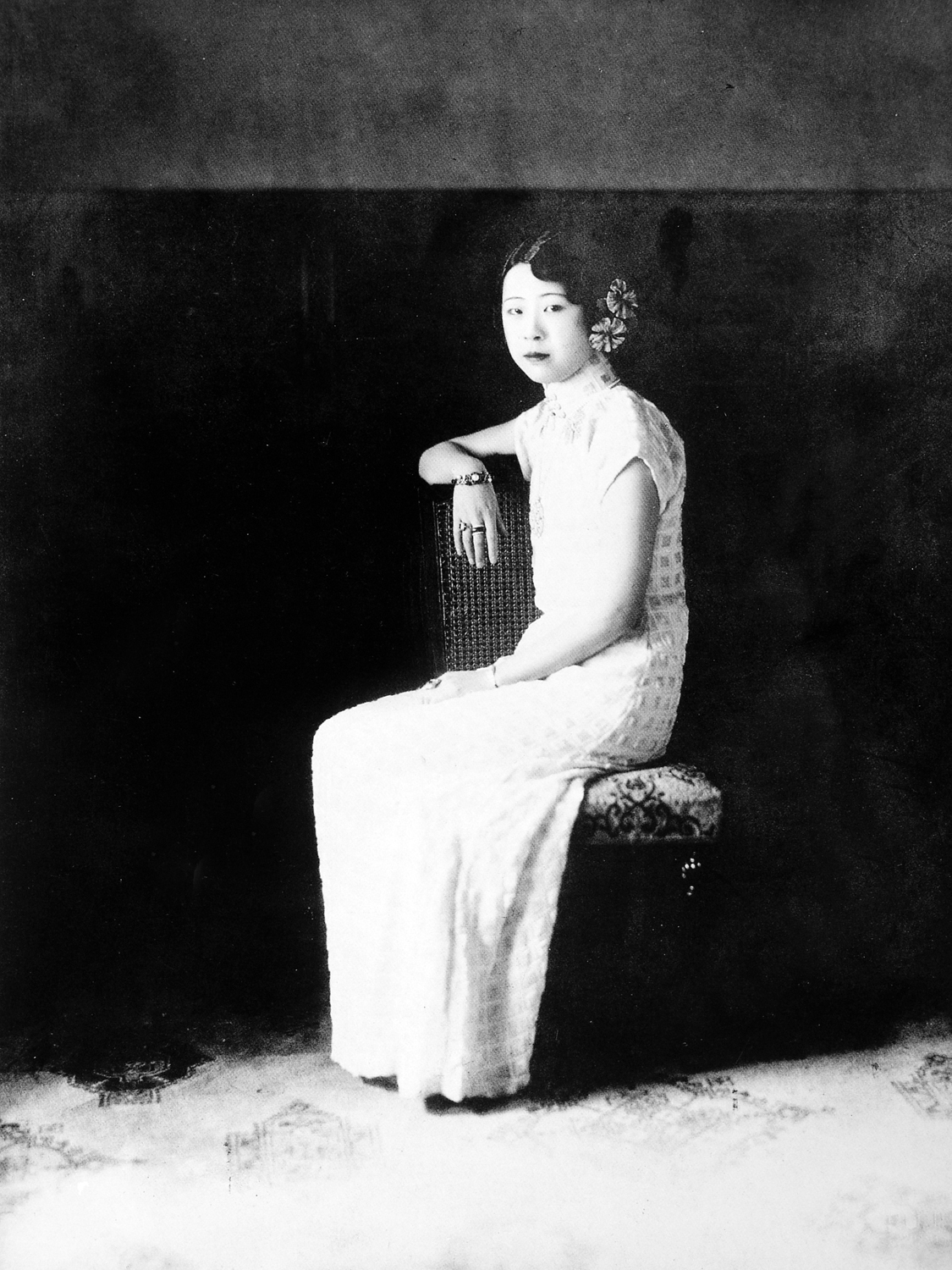 中文（中国大陆）: 明贤贵妃肖像